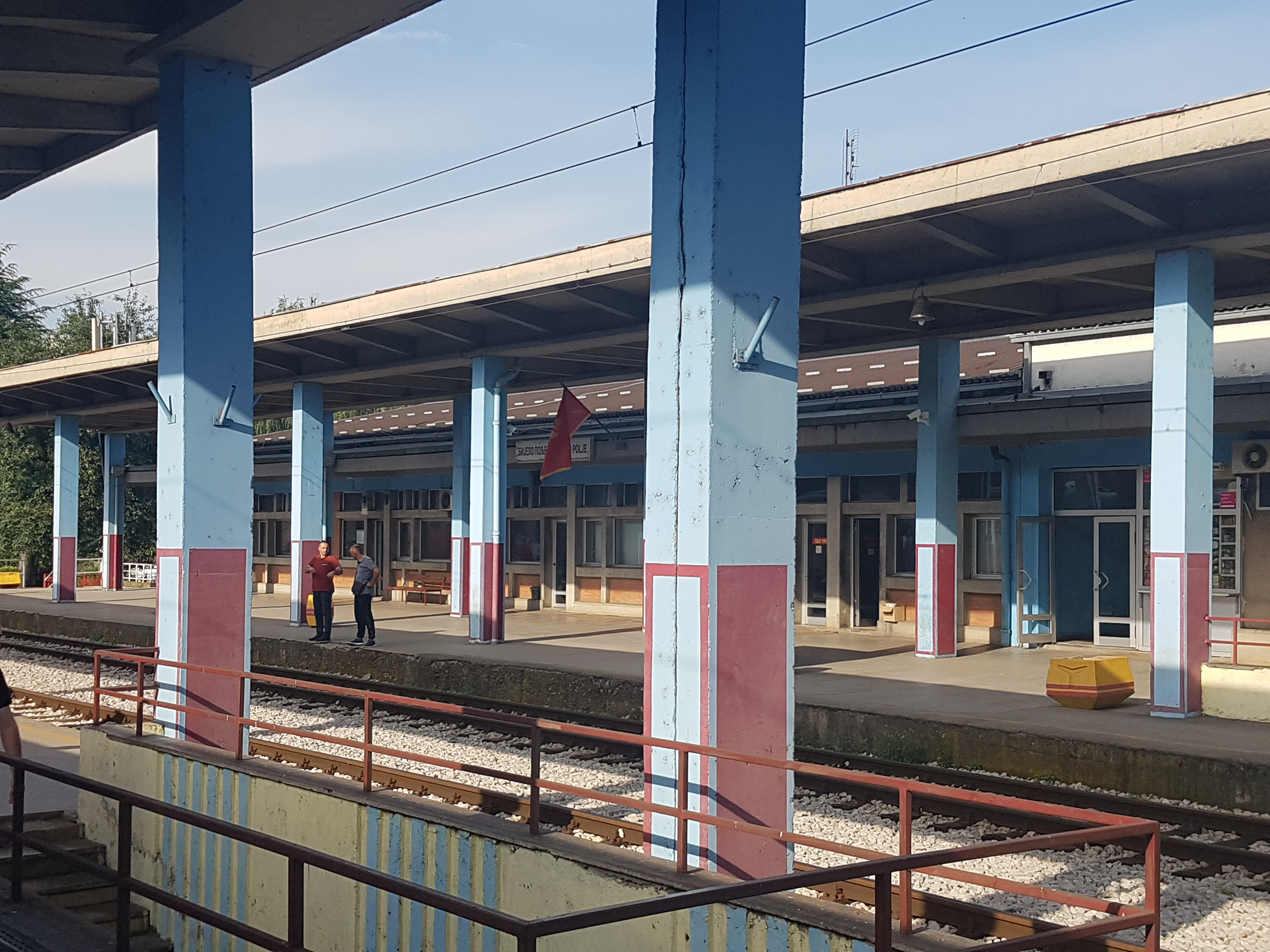 Vue de la gare de Bijelo Polje depuis la fenêtre du train de la ligne Belgrade-Bar (2018).